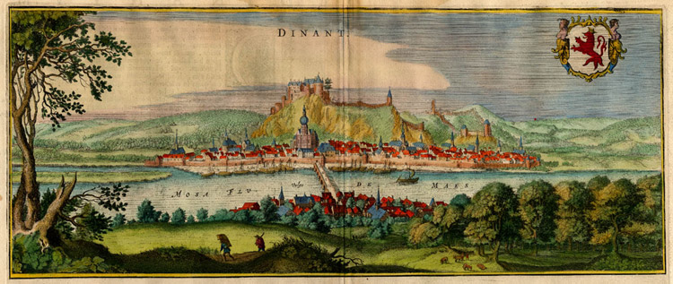 Dinant